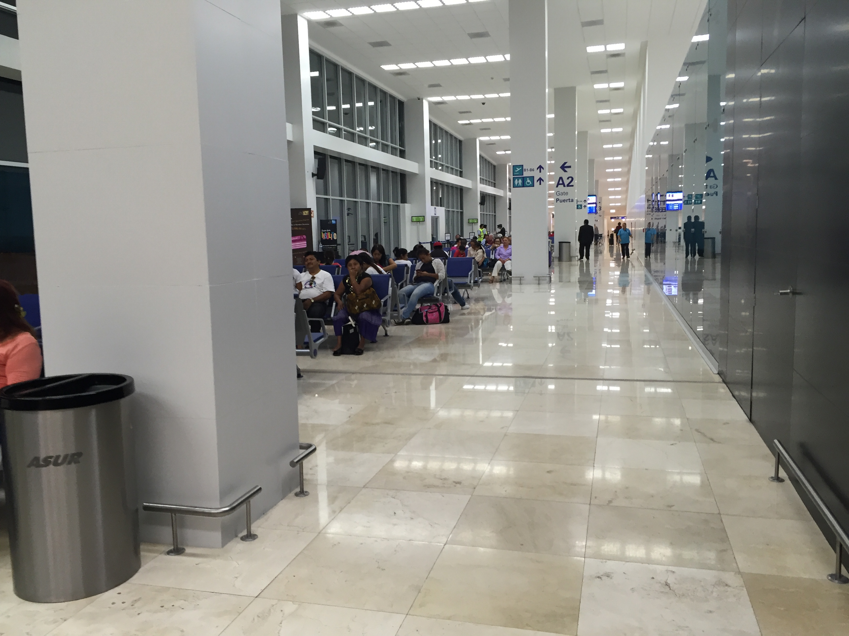 Sala A del Aeropuerto Internacional de Veracruz.